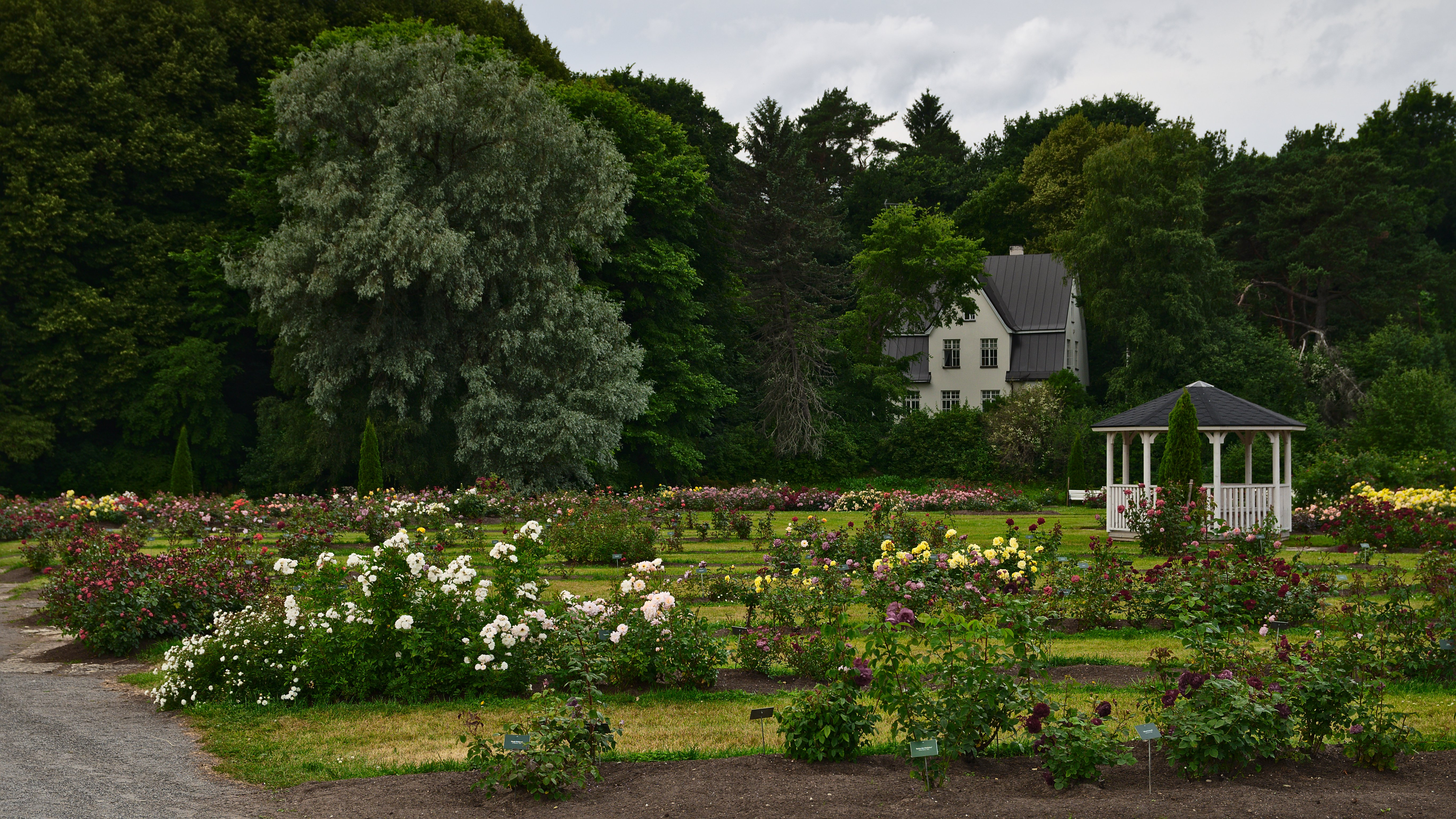 Tallinna Botaanikaaia rosaarium.